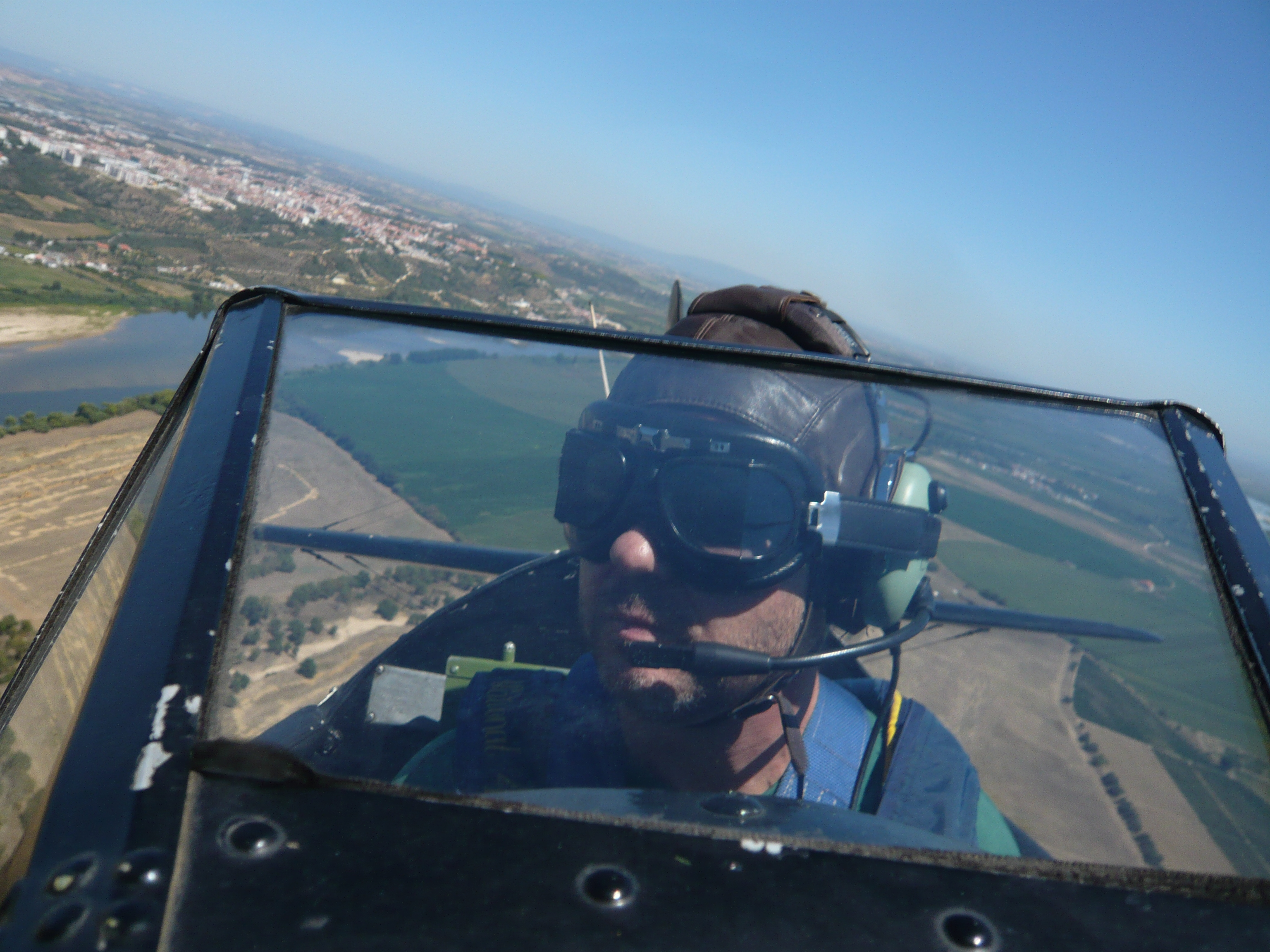 Por ocasião do aniversário do Museu Aero Fénix, em Santarém (2009) O piloto, Pedro Cerveira Pinto. E tive direito a 2 loops!!! Valeu a pena esperar tantos anos :D